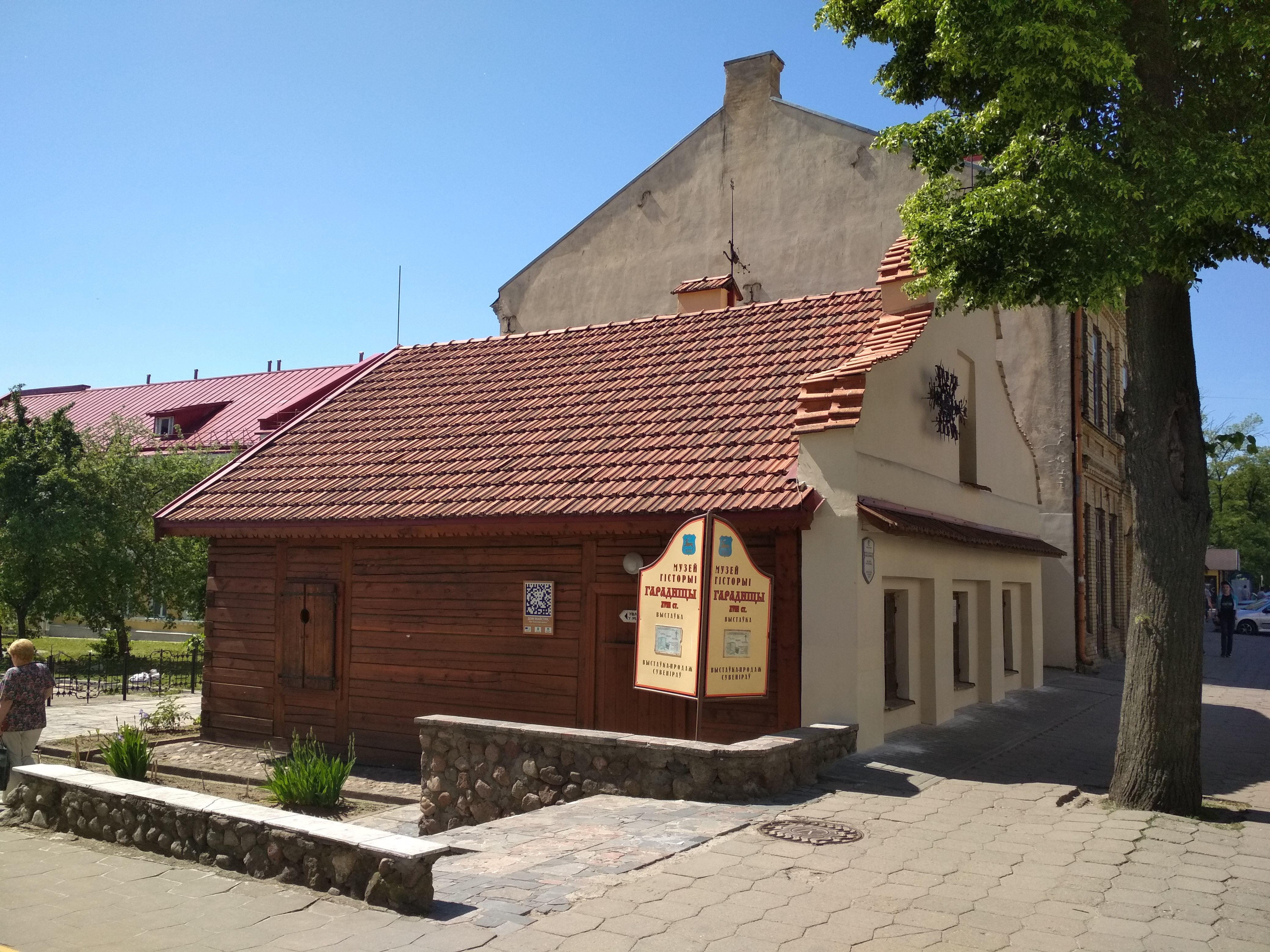 Гродна (2018). Вуліца Ажэшка. Дом рамесніка